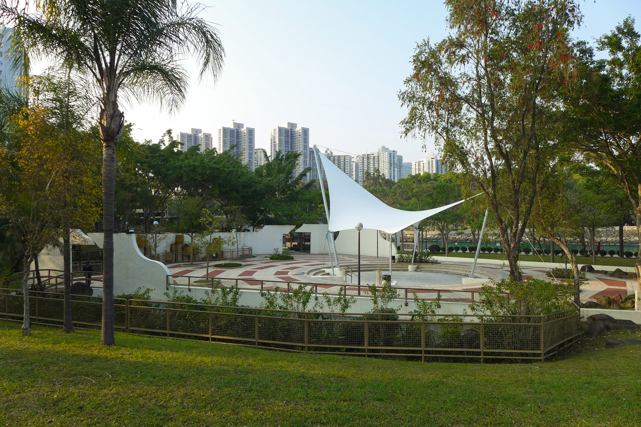 Yuen Chau Tsai Park